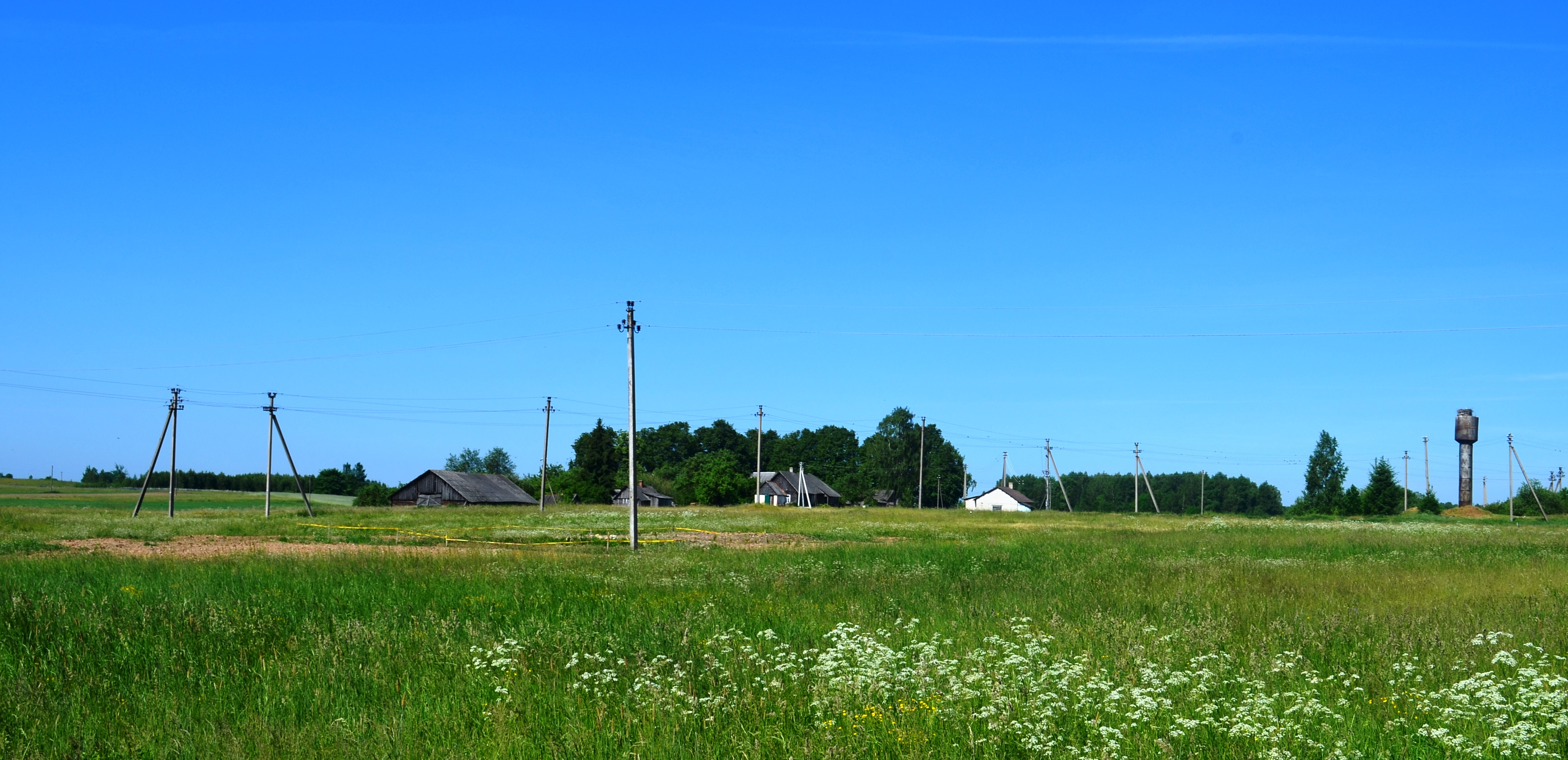 Našiūnai, Vilniaus raj.